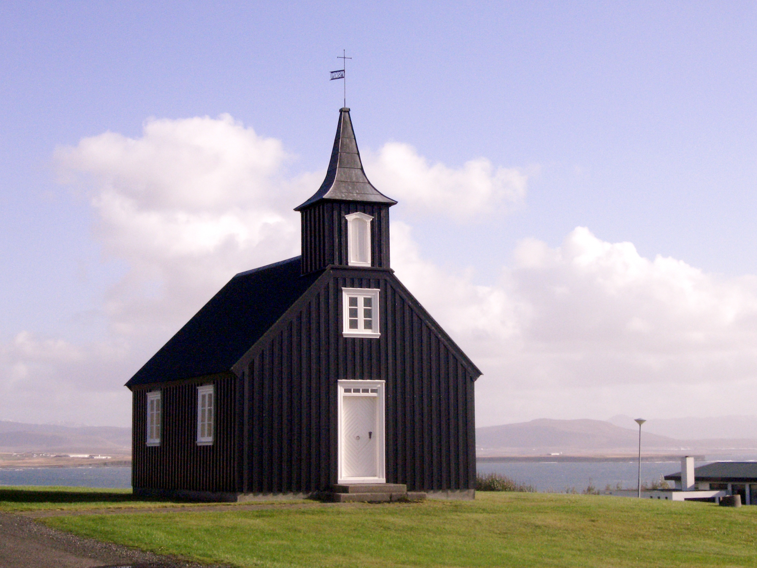 Brautarholtskirkja í Kjalarnesprófastsdæmi